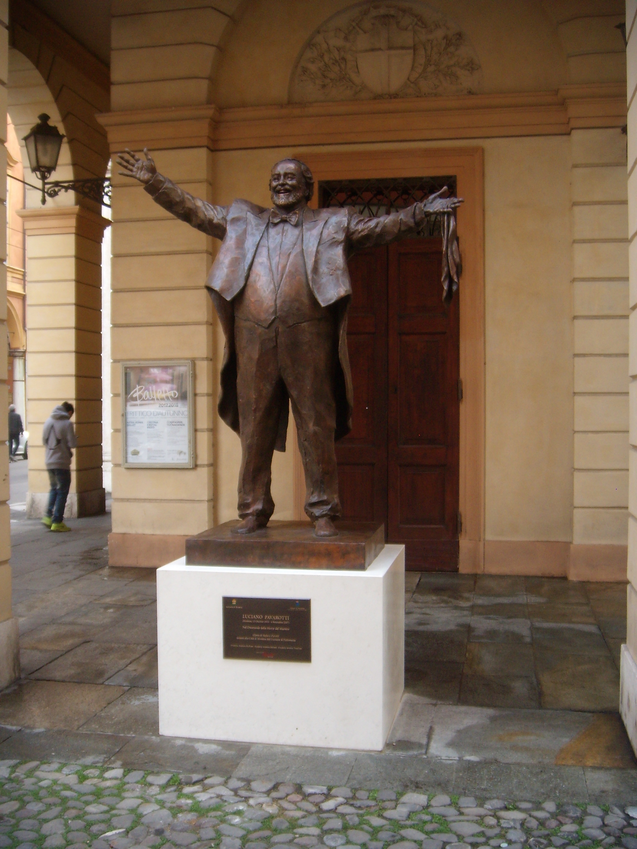 Una statua raffigurante Pavarotti in memoria del decimo anniversario della sua morte